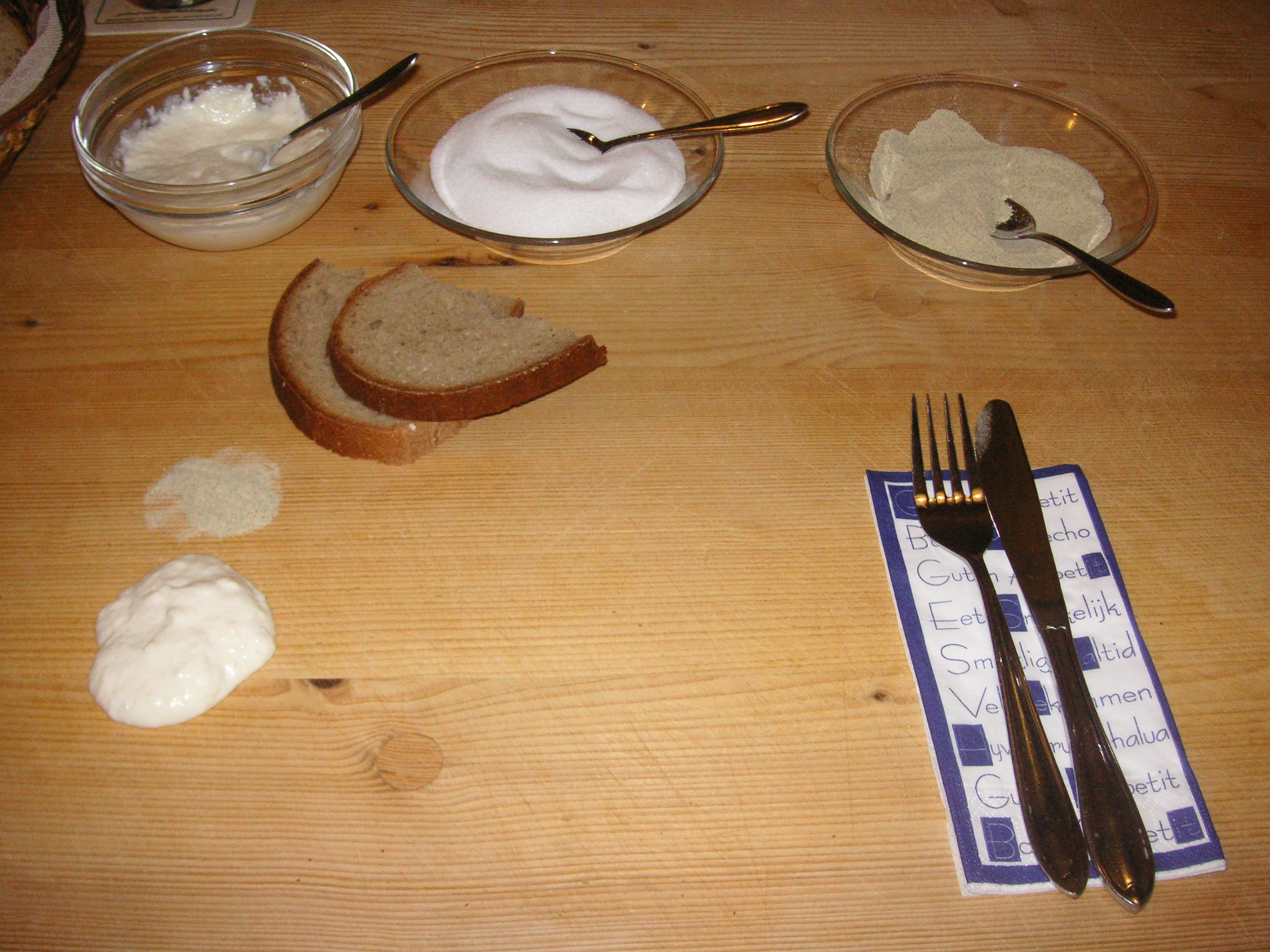 Bild einer "Original Schweinfurter Schlachtschüssel". Das Bild zeigt das Besteck zusammen mit Salz/Pfeffer, Brot und Kren (Meerrettich).